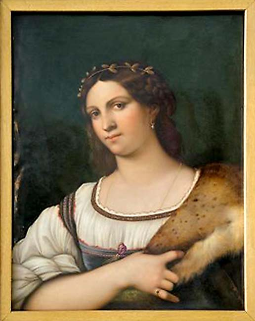 Placca in porcellana con la riproduzione di un'opera di Sebastiano del Piombo. Ginori a Doccia, secondo quarto del XIX secolo.